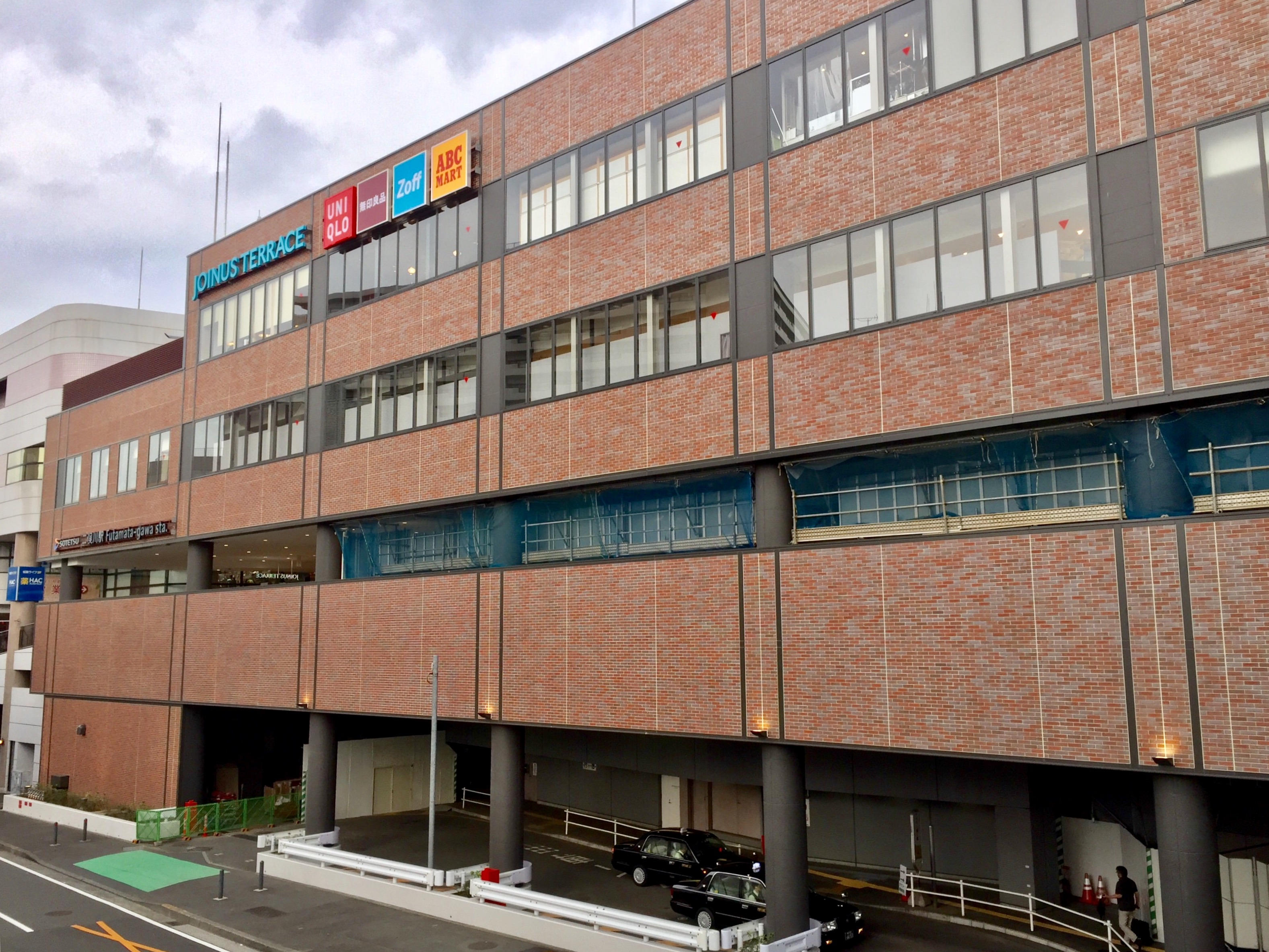 二俣川駅駅舎の外観（北側より撮影）。相鉄デザインブランドアッププロジェクトに基づき、レンガを用いた外観にリニューアル。上部はJOINUS TERRACE 二俣川（ジョイナステラス2）。